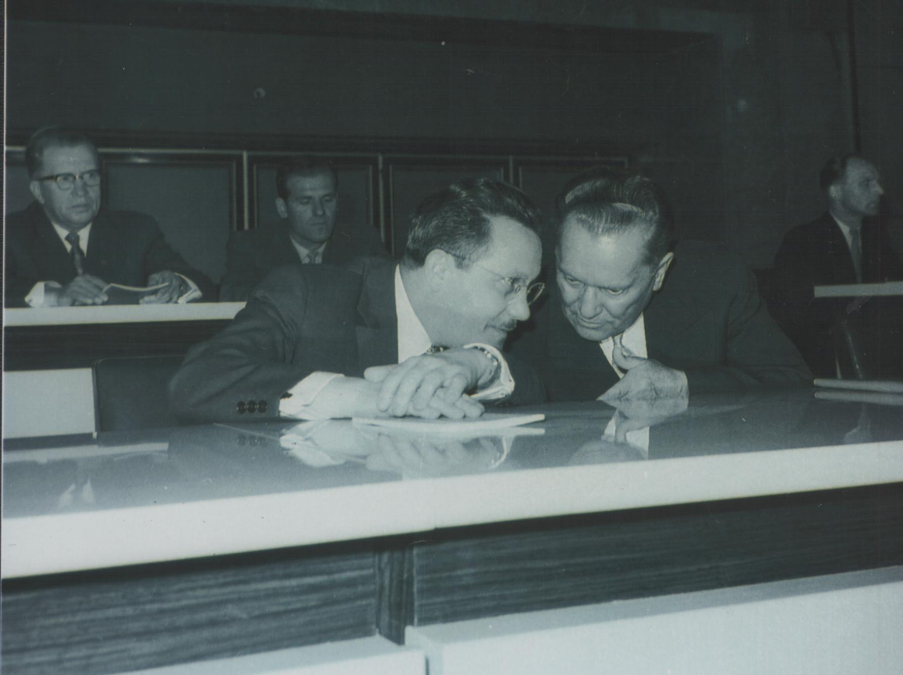 Tito i Edvard Kardelj. foto: Stevan Kragujević (po odobrenju kćerke Tanje Kragujević)